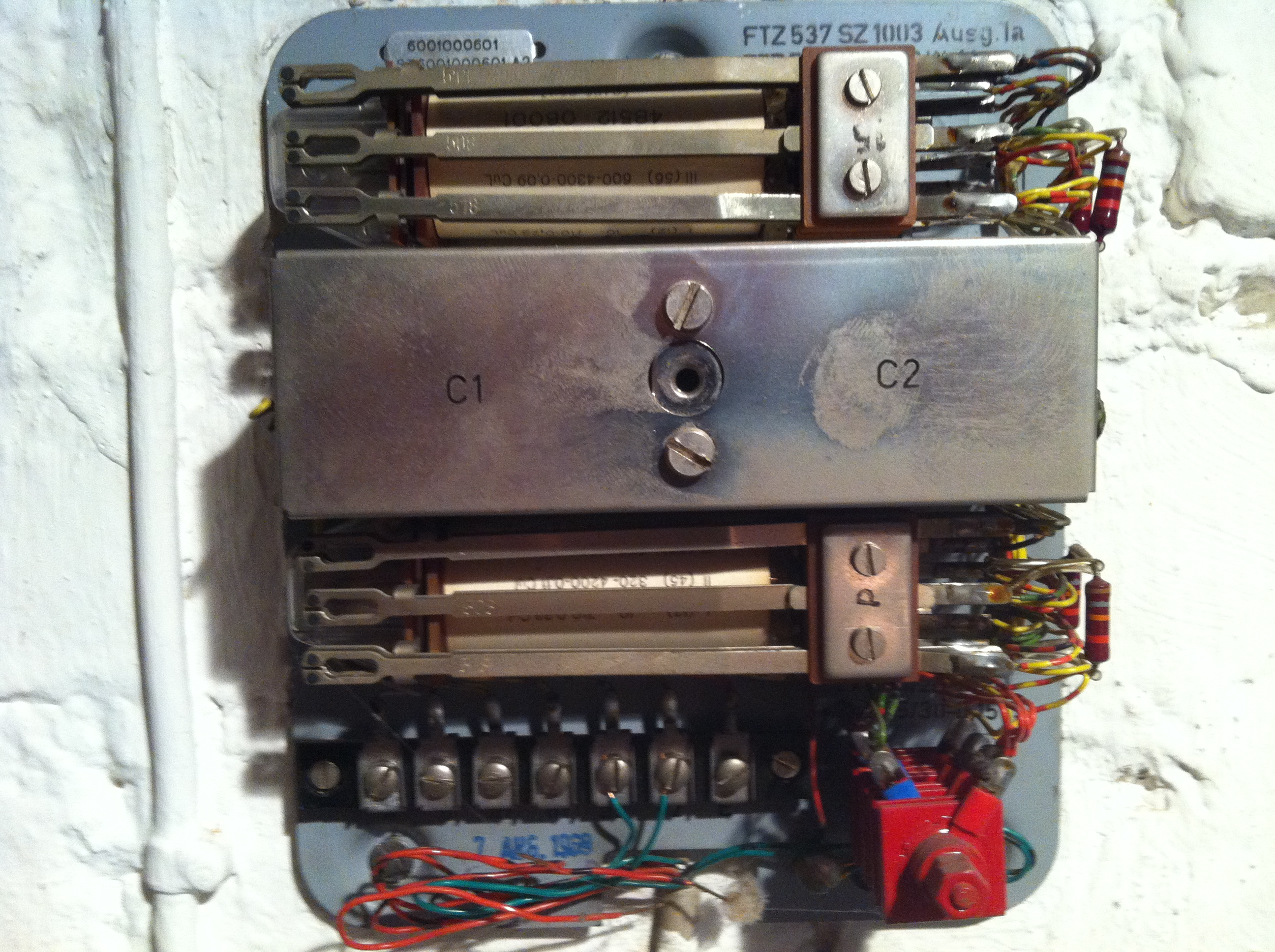 Draufsicht eines SEL 1/2 GUm 53